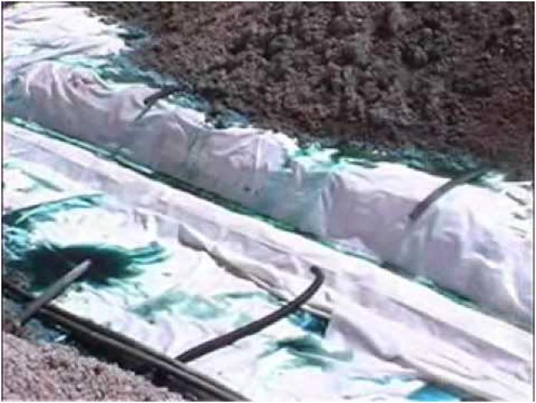 Lixiviación en pads, en Cerro verde, Arequipa.